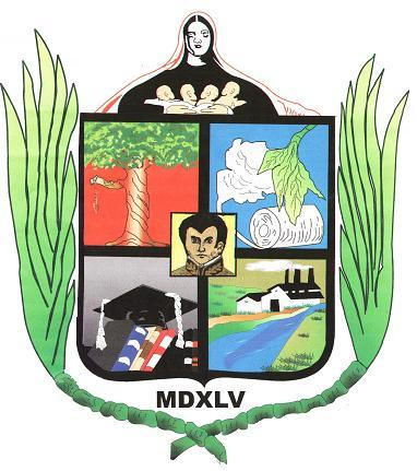 Es el escudo del Municipio Moran, Estado Lara Venezuela